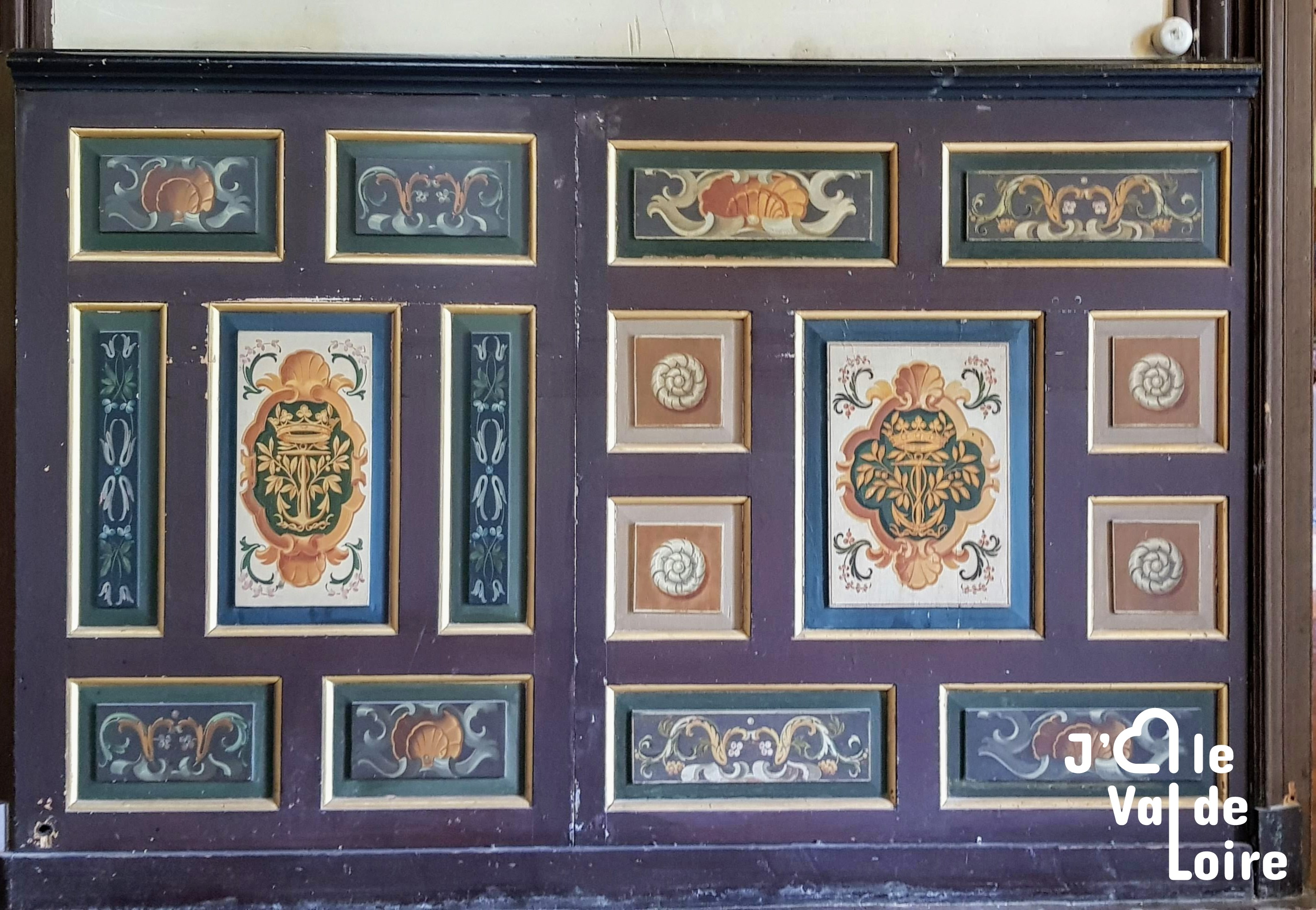 Boiserie provenant du Château de Richelieu - Château de Champchevrier